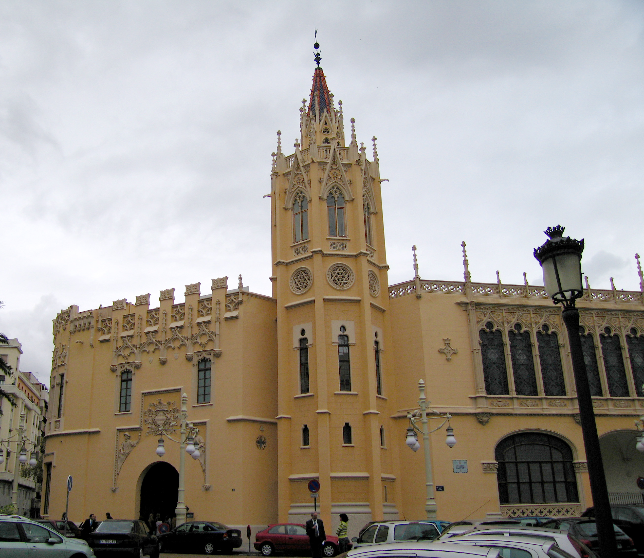 Palau de l'Exposició de València